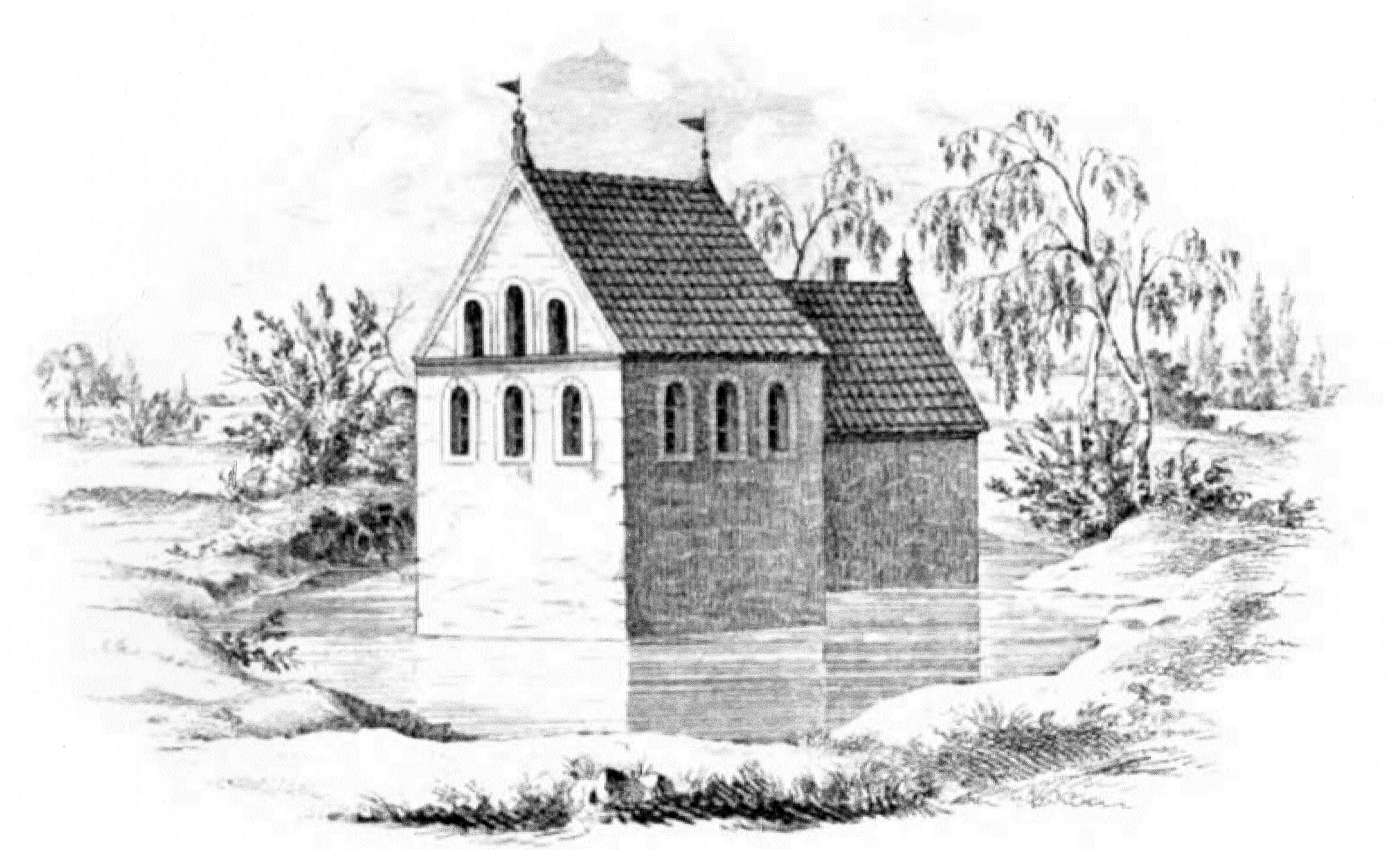 Edelhof Eschelsmark, Zeichnung von Köhler und Roisternitz 1862